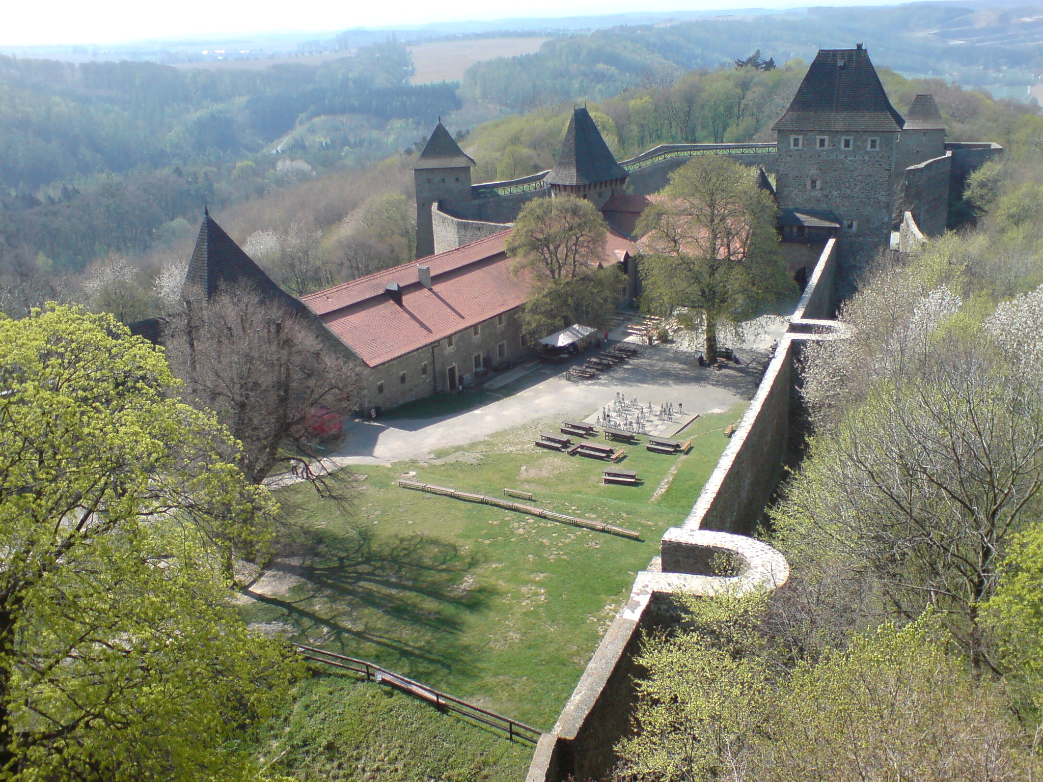 Hrad Helfštýn